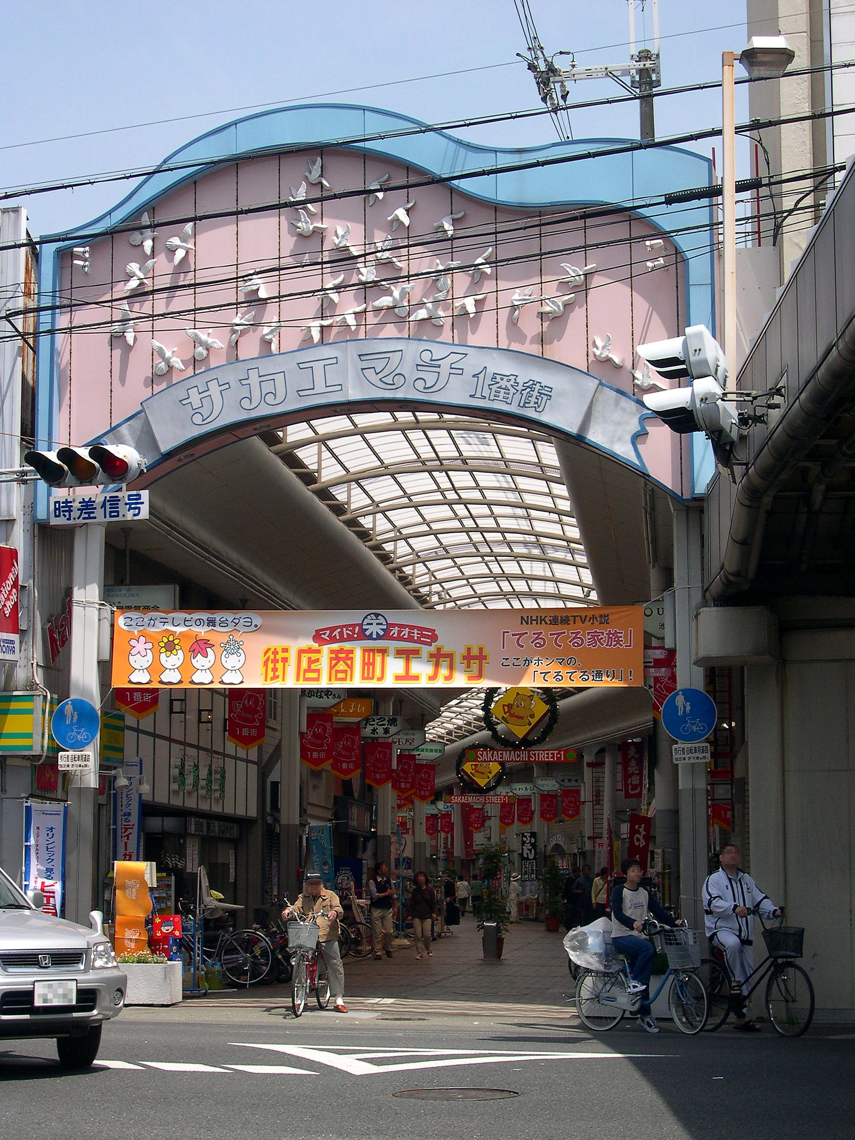 Teruteru1430r3.jpg